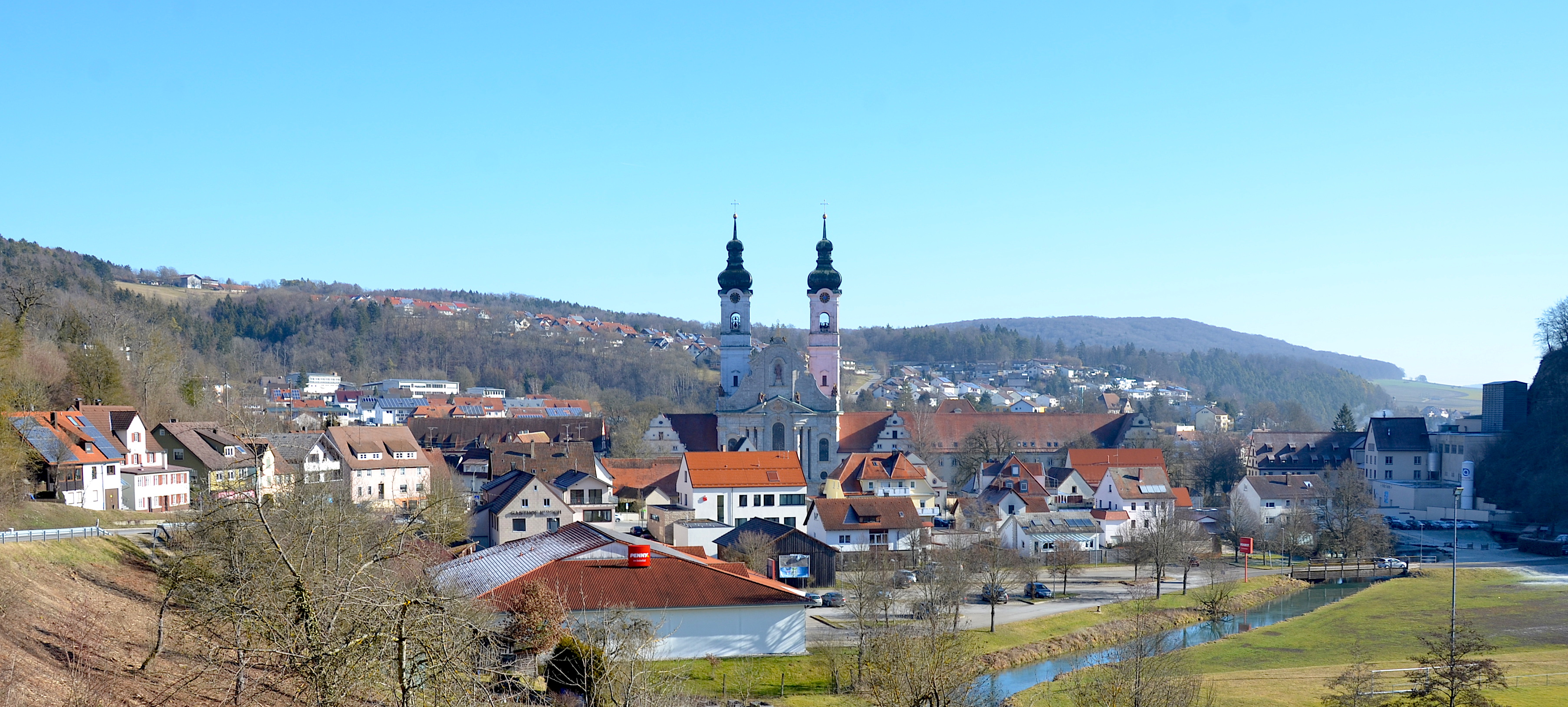 Zwiefalten in Baden-Württemberg